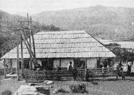 Старая мечеть аула Калеж в 1916 году